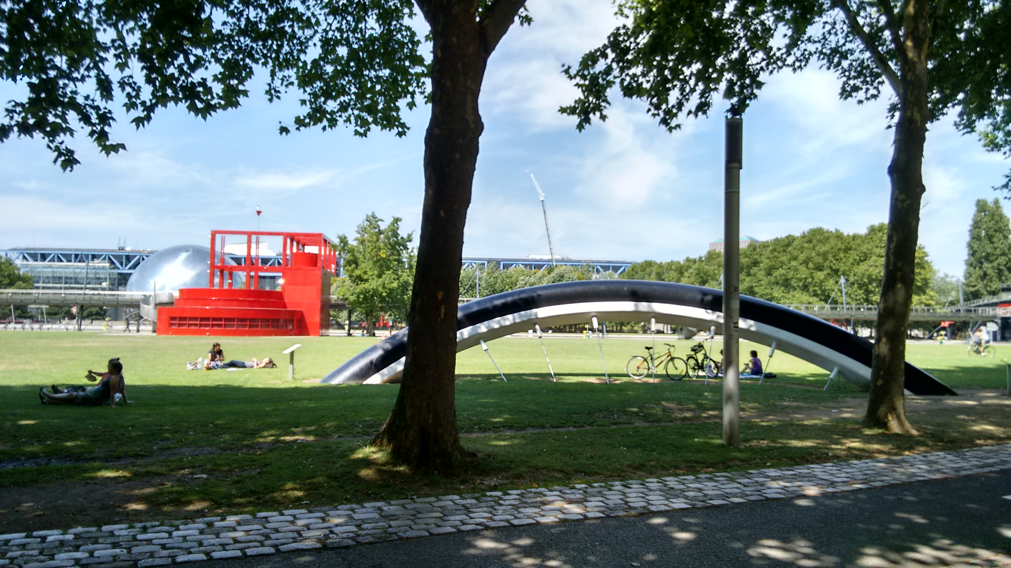 Esculturas no La Villete